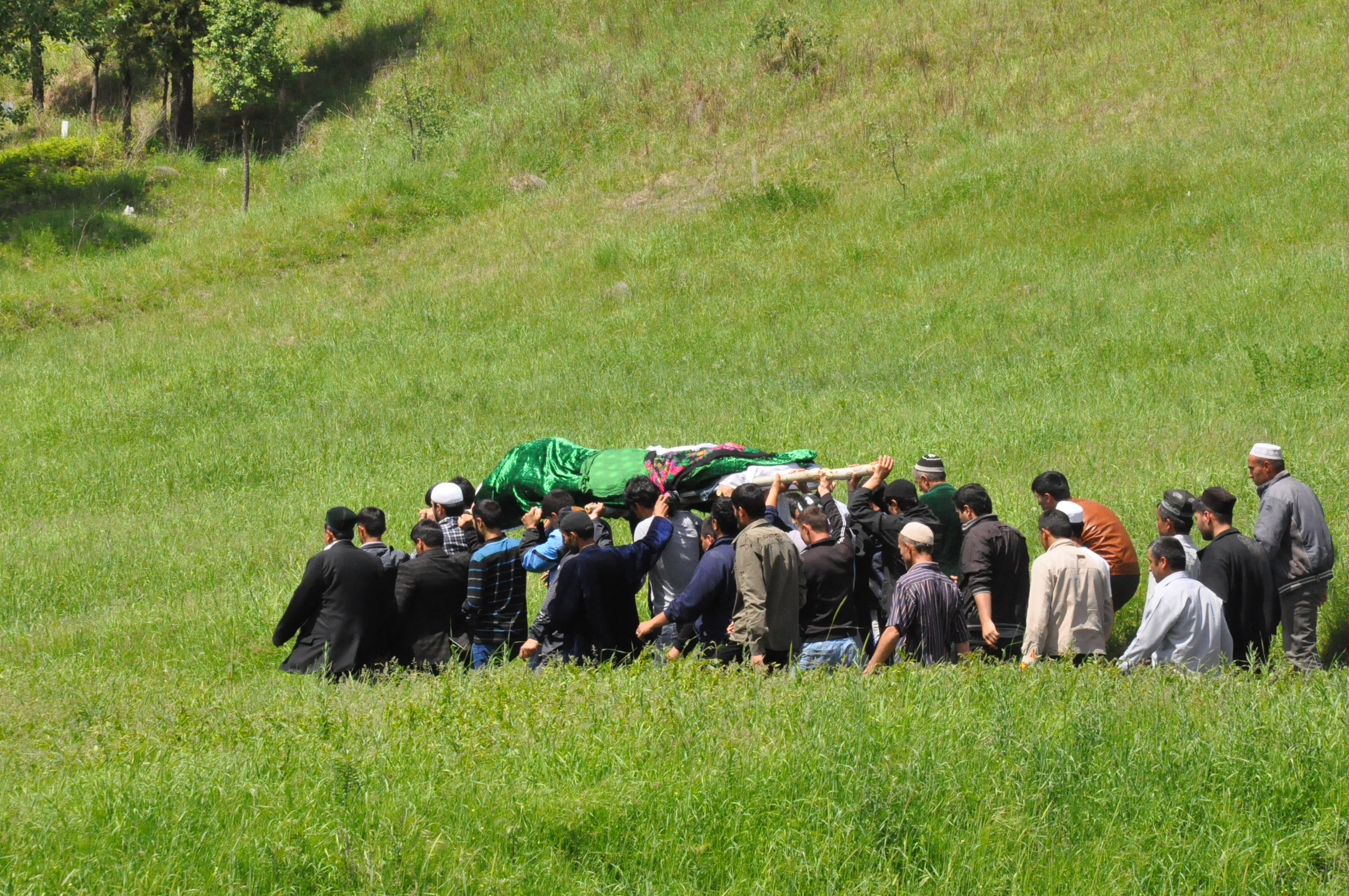 Тоҷикӣ: Маросими Ҷаноза. Дар деҳаи Қасамдараи ноҳияи Файзобод. ТоҷикистонТоҷикӣ: Похоронный ритуал в селе Касамдара, Файзабадский район, Таджикистан